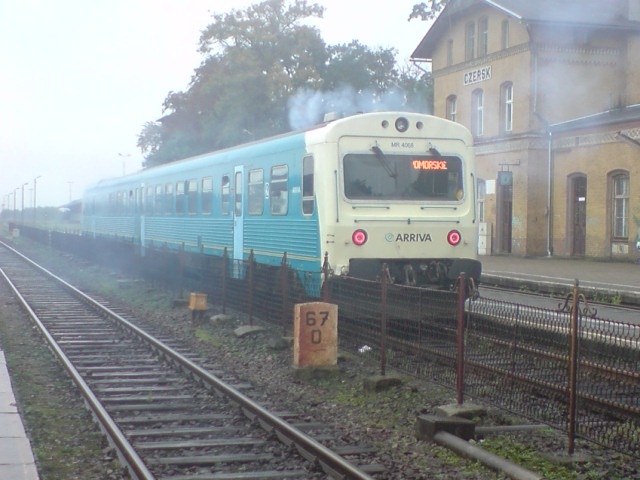 Spalinowy zespół trakcyjny MR/MRD odjeżdzający z Czerska do Laskowic.